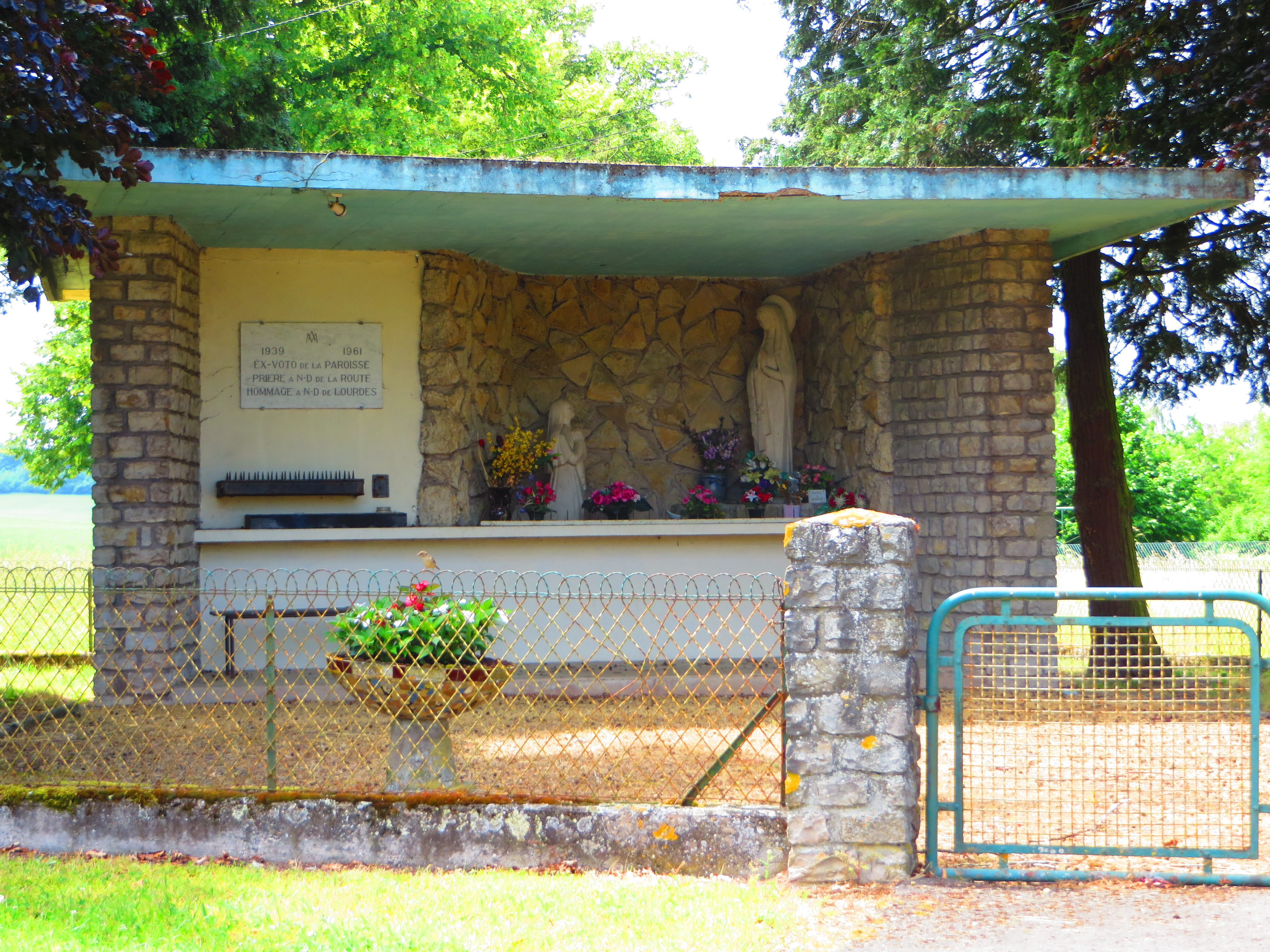 Maizieres Vic chapelle